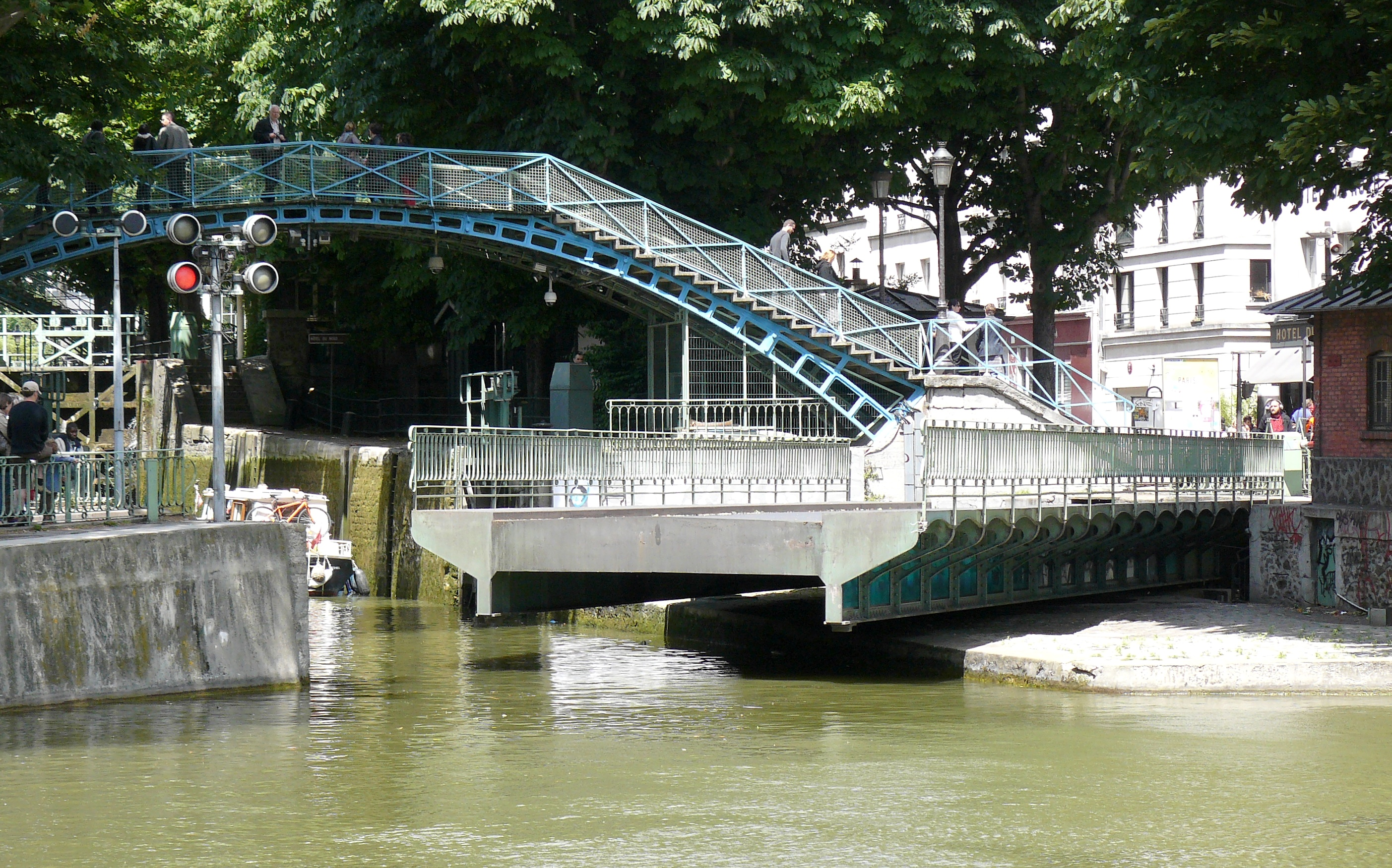 Canal Saint-Martin, 10e arrondissement de Paris, pont tournant de "la grange aux belles", en cours de manoeuvre, vu quai de Valmy, en arrière plan, la passerelle piétonne.